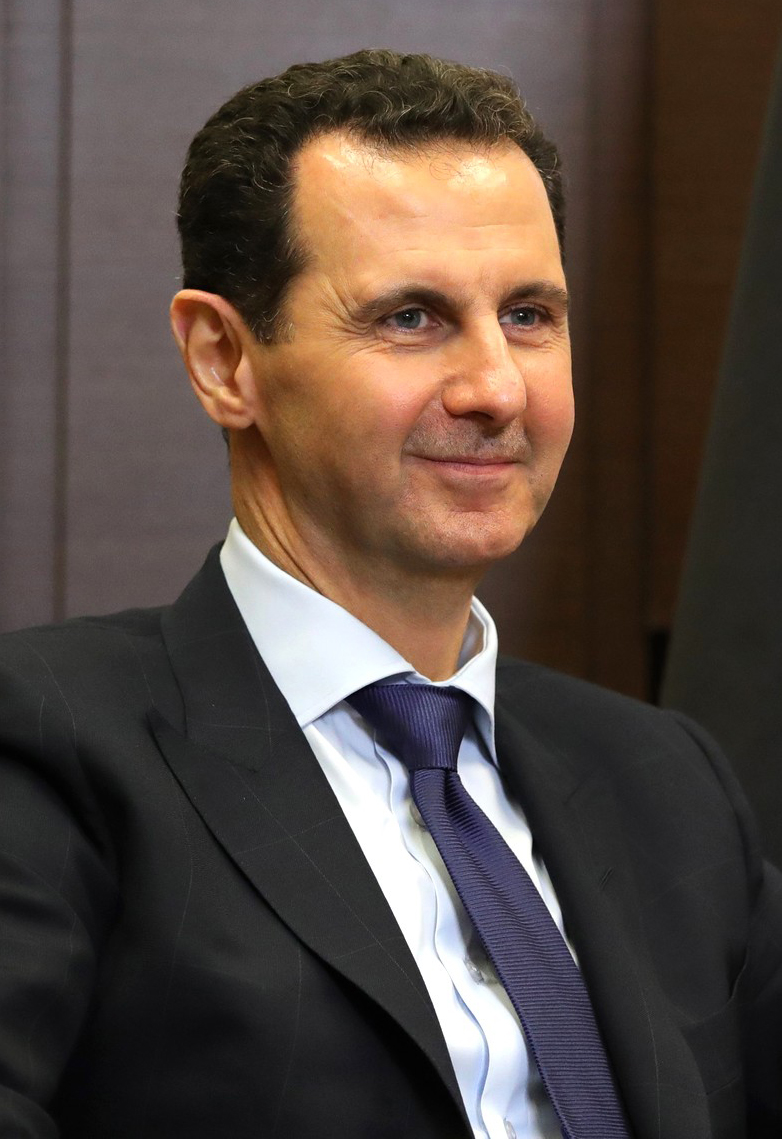 Президент Сирийской Арабской Республики Башар Асад во время переговоров с Президентом России Владимиром Путиным